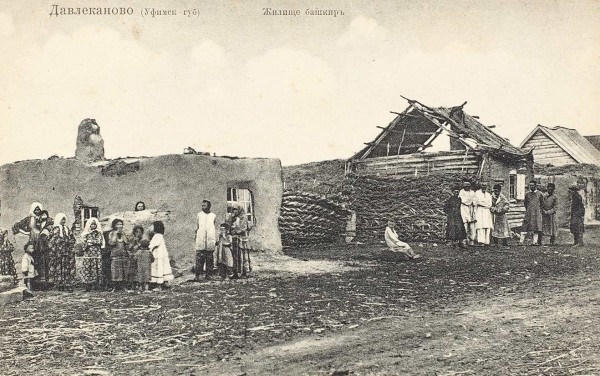 Давлеканово. Жилище башкир 1905 – 1915, Россия, Башкортостан, Давлекановский район